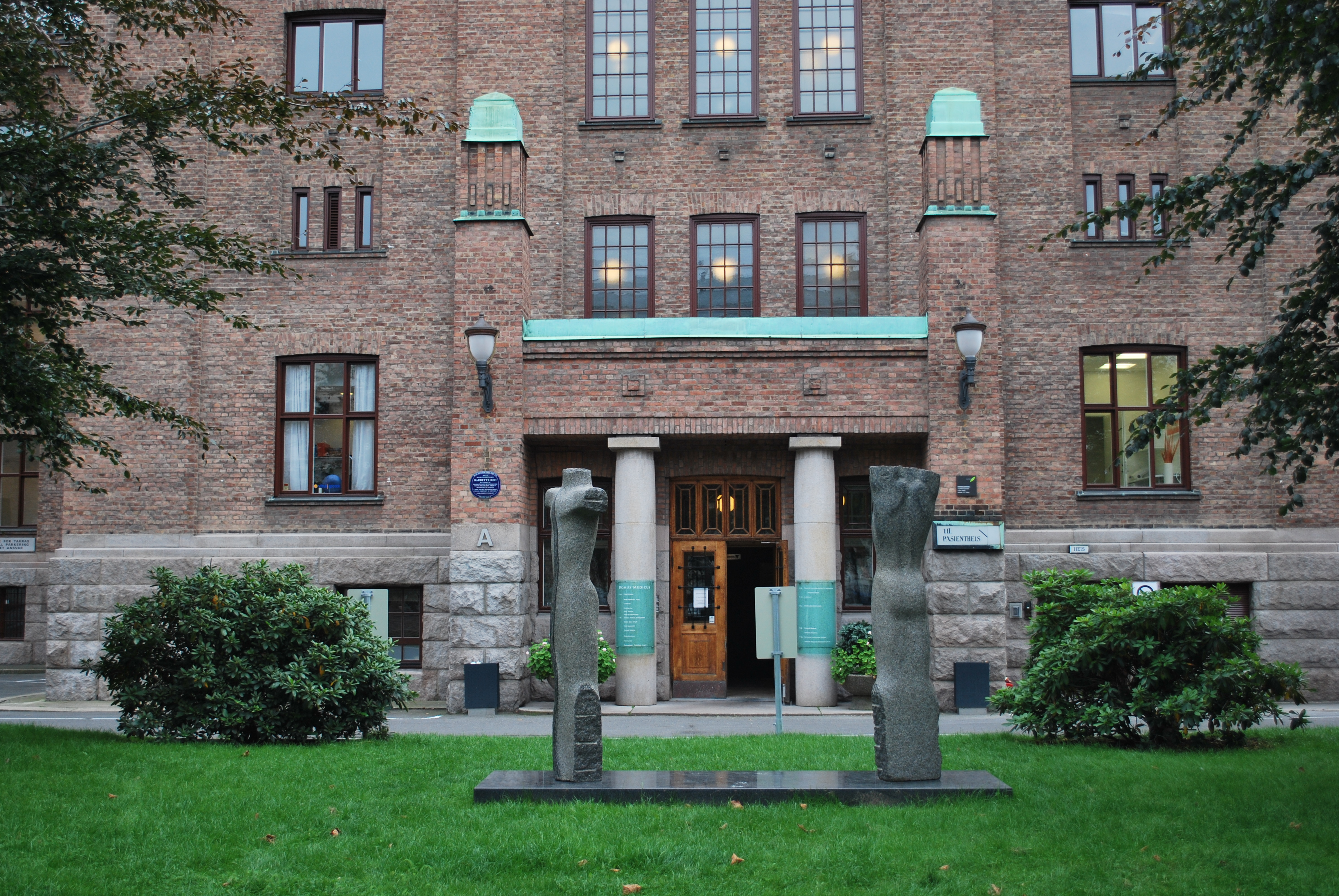 Kvinneklinikken, inngangspartiet med skulptur To av Nico Widerberg. Pilestredet park, Oslo